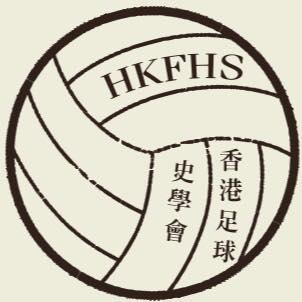 香港足球史學會會徽